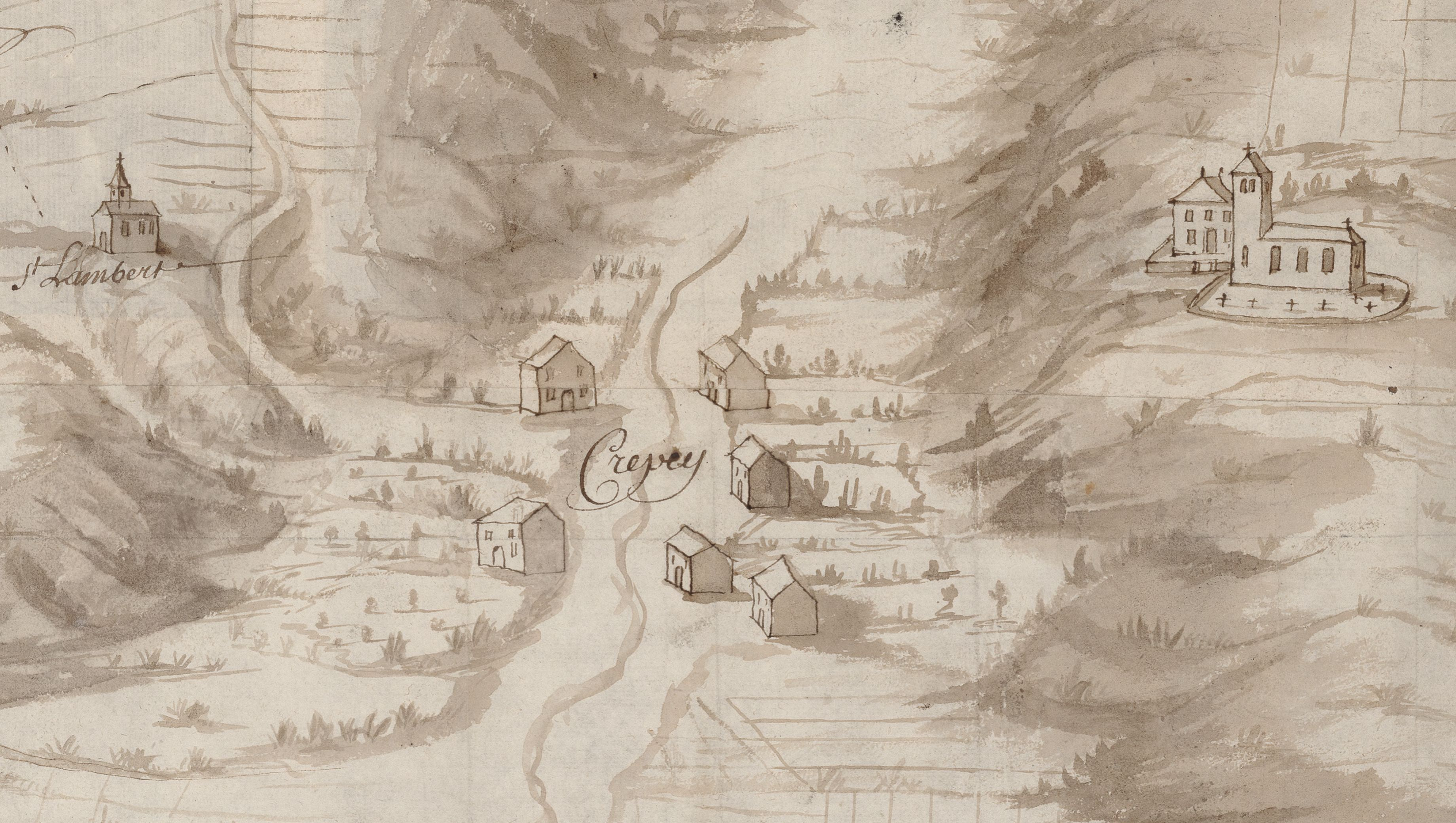 Zoom sur la commune de Crépey en 1726